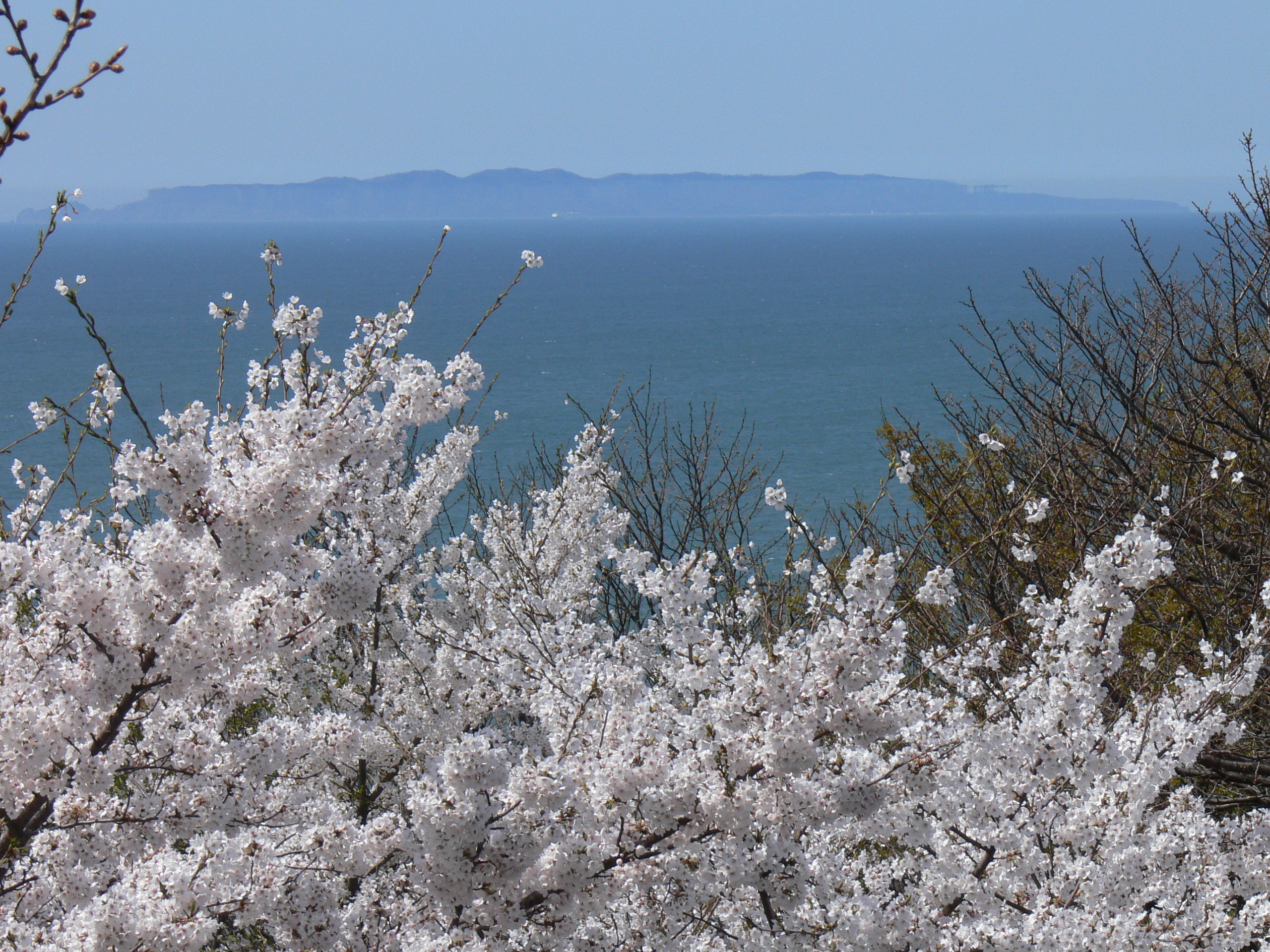 諸上寺公園から粟島